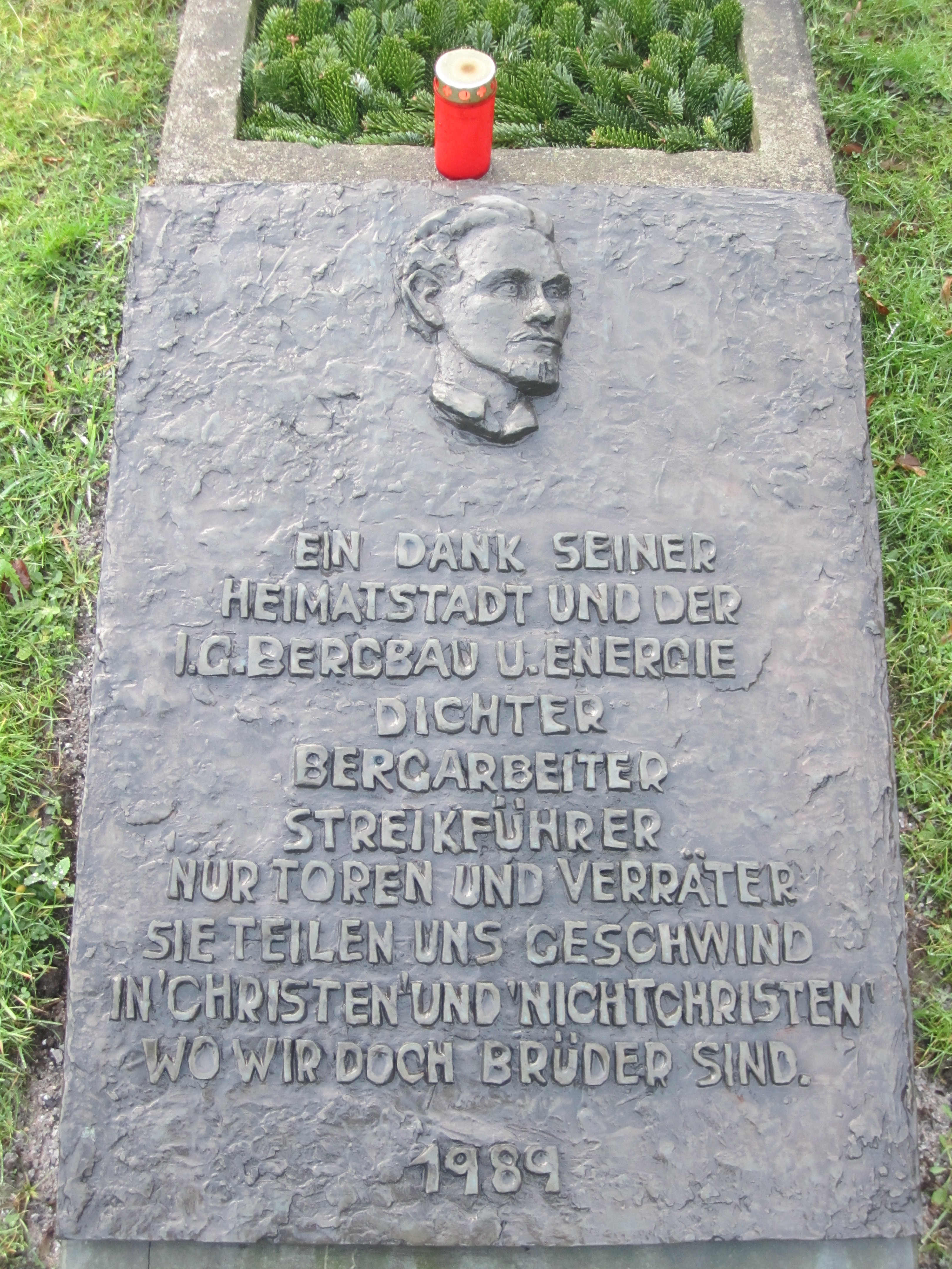 Grabstätte des Bergarbeiter und Arbeiterdichters Heinrich Kämpchen auf dem katholischen Friedhof Bochum-Linden. Das Ehrengrab ist seit 1989 mit einer von Tisa von der Schulenburg gestalteten Gedenktafel bedeckt.